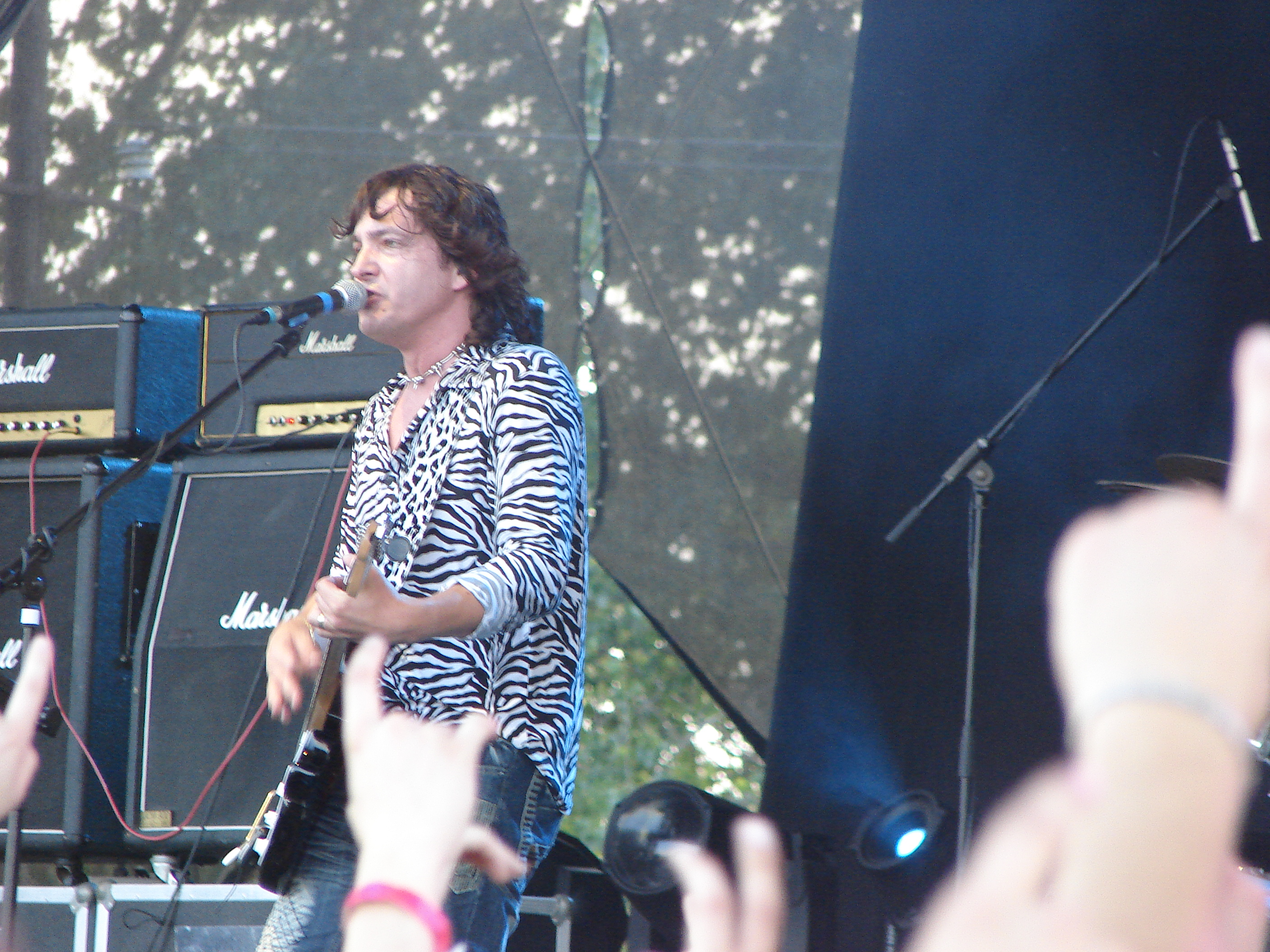 Maťo Durinda zo skupiny Tublatanka na festivale Topfest 2009